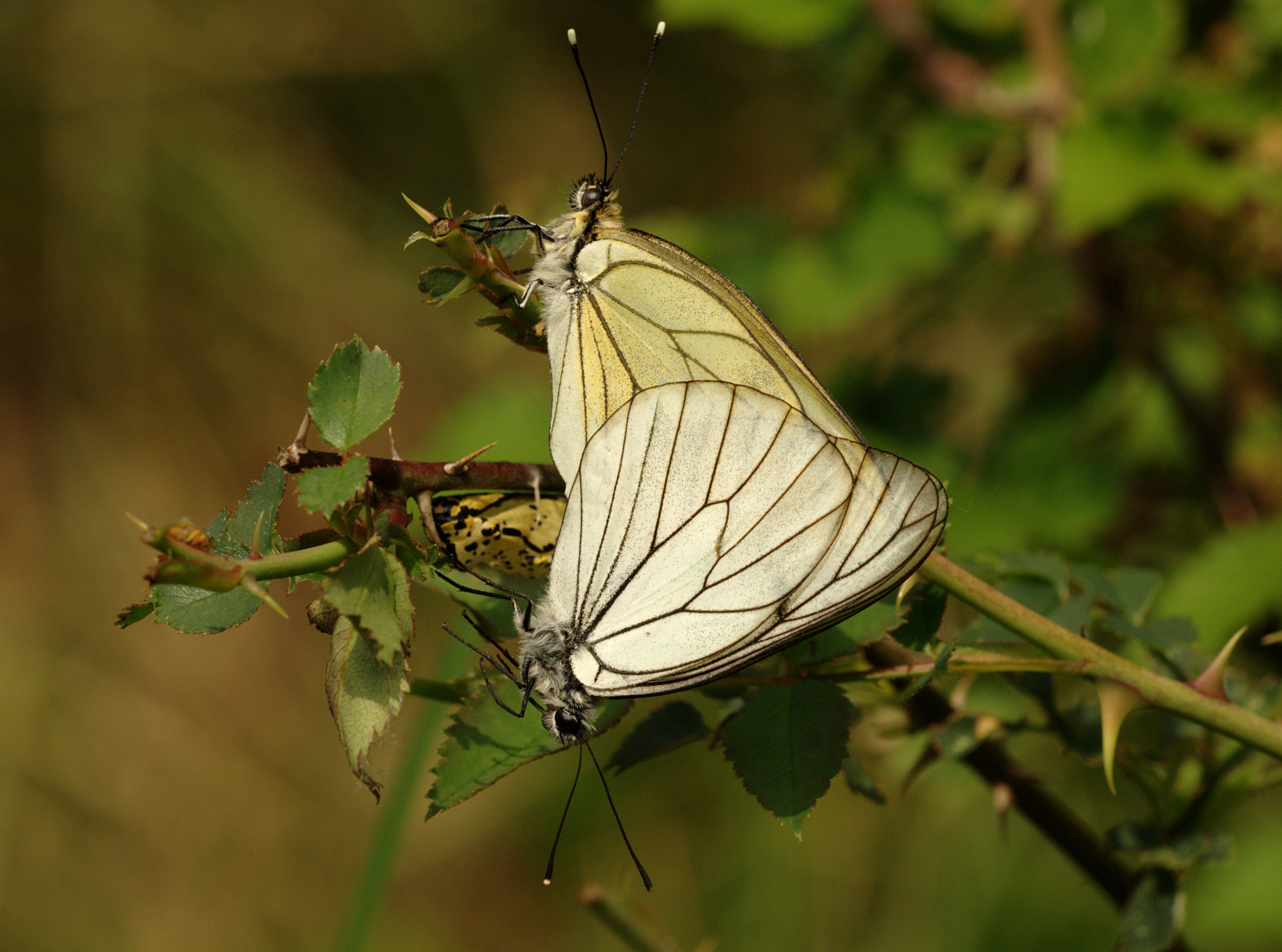 Aporia crataegi, mating